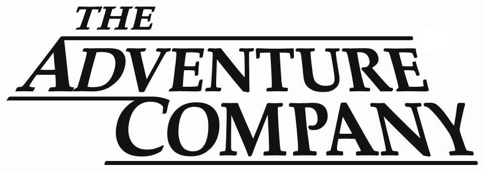 Logo des Publishinglabes The Adventure Company